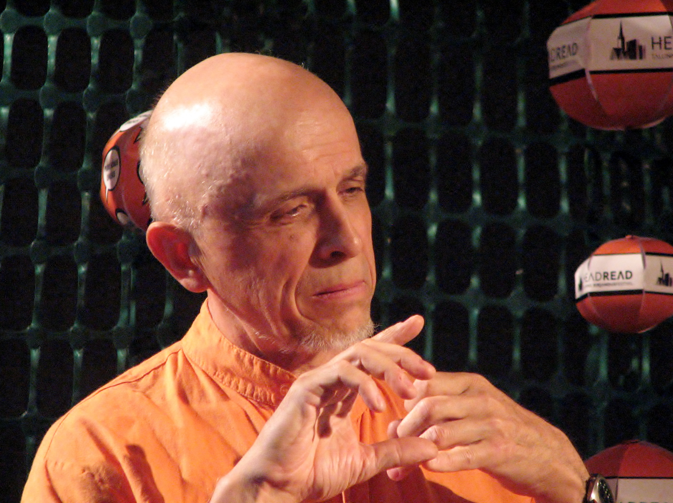 Mihkel Mutt esinemas kirjandusfestivalil HeadRead Kirjanike Maja musta laega saalis